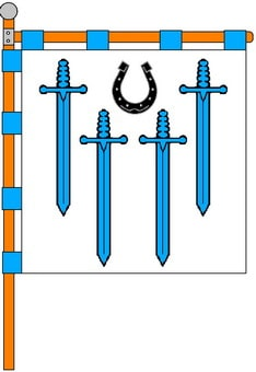 Прапор Люблинецької селищної територіальної громади